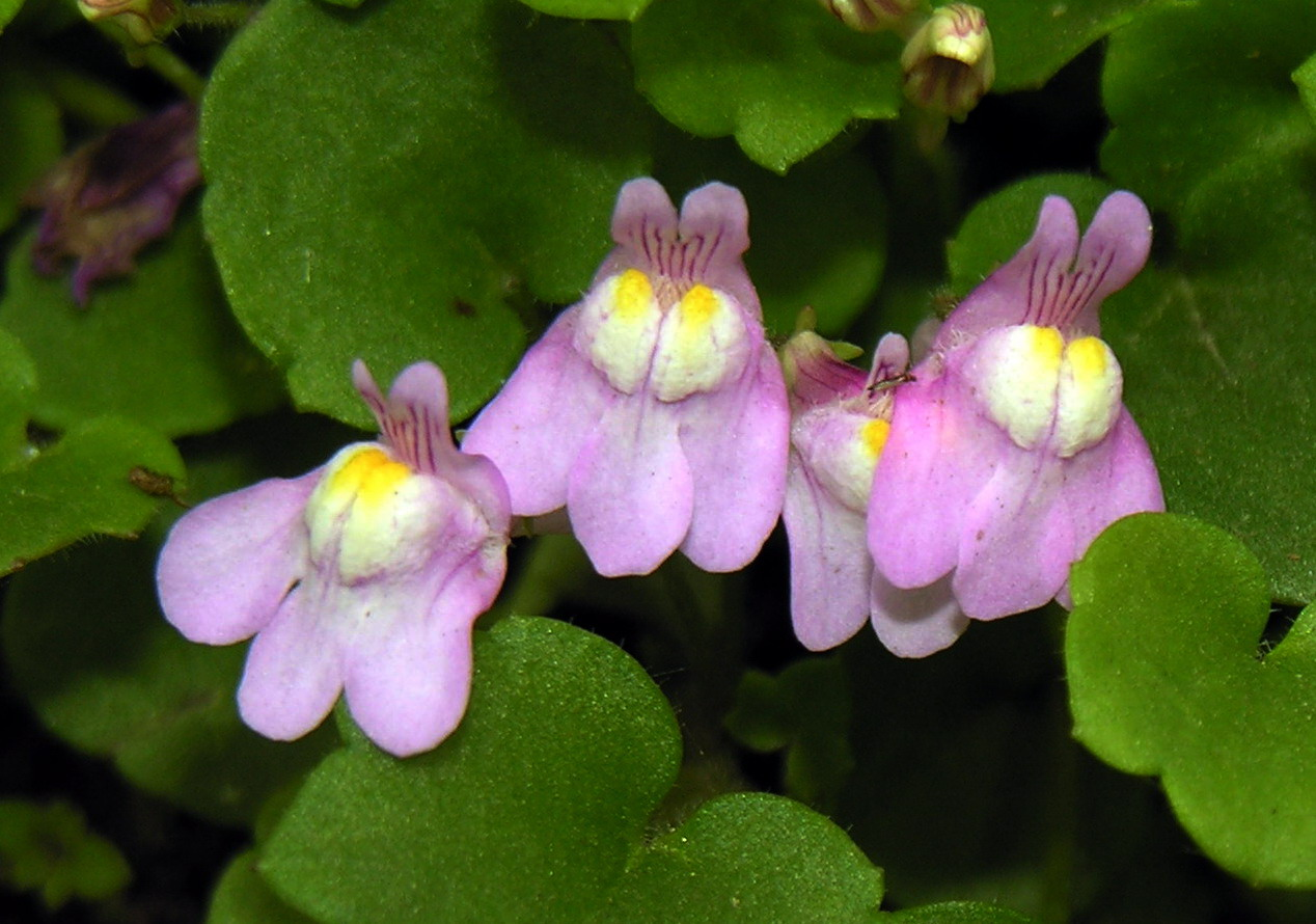 Cymbalaria muralis flawers. Fam. Plantaginaceae